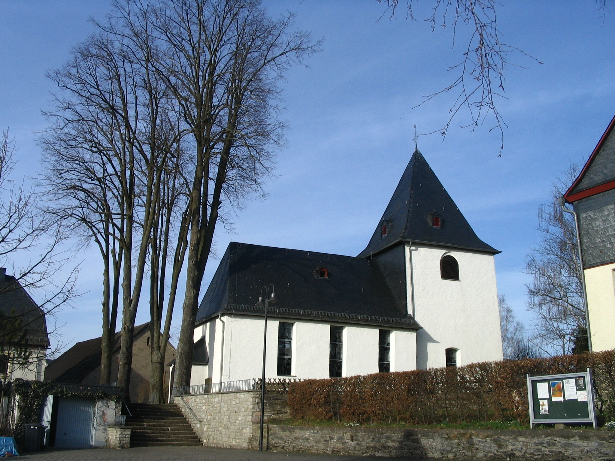 ev. Kirche in Neuerkirch/Hunsrück